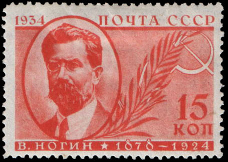 Почтовая марка СССР - Виктор Павлович Ногин, — российский революционер